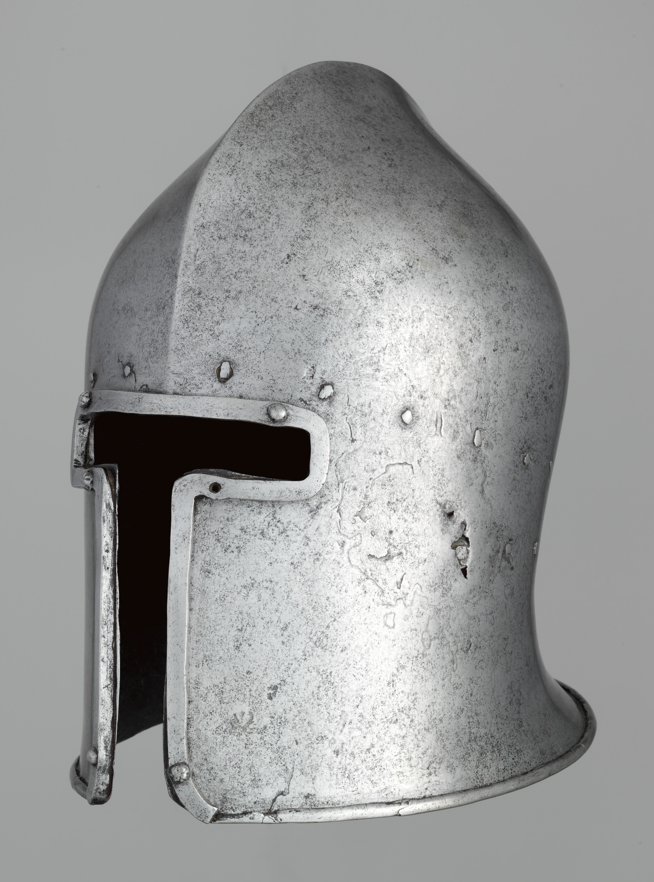 Italian, Milan; Barbute; Helmets